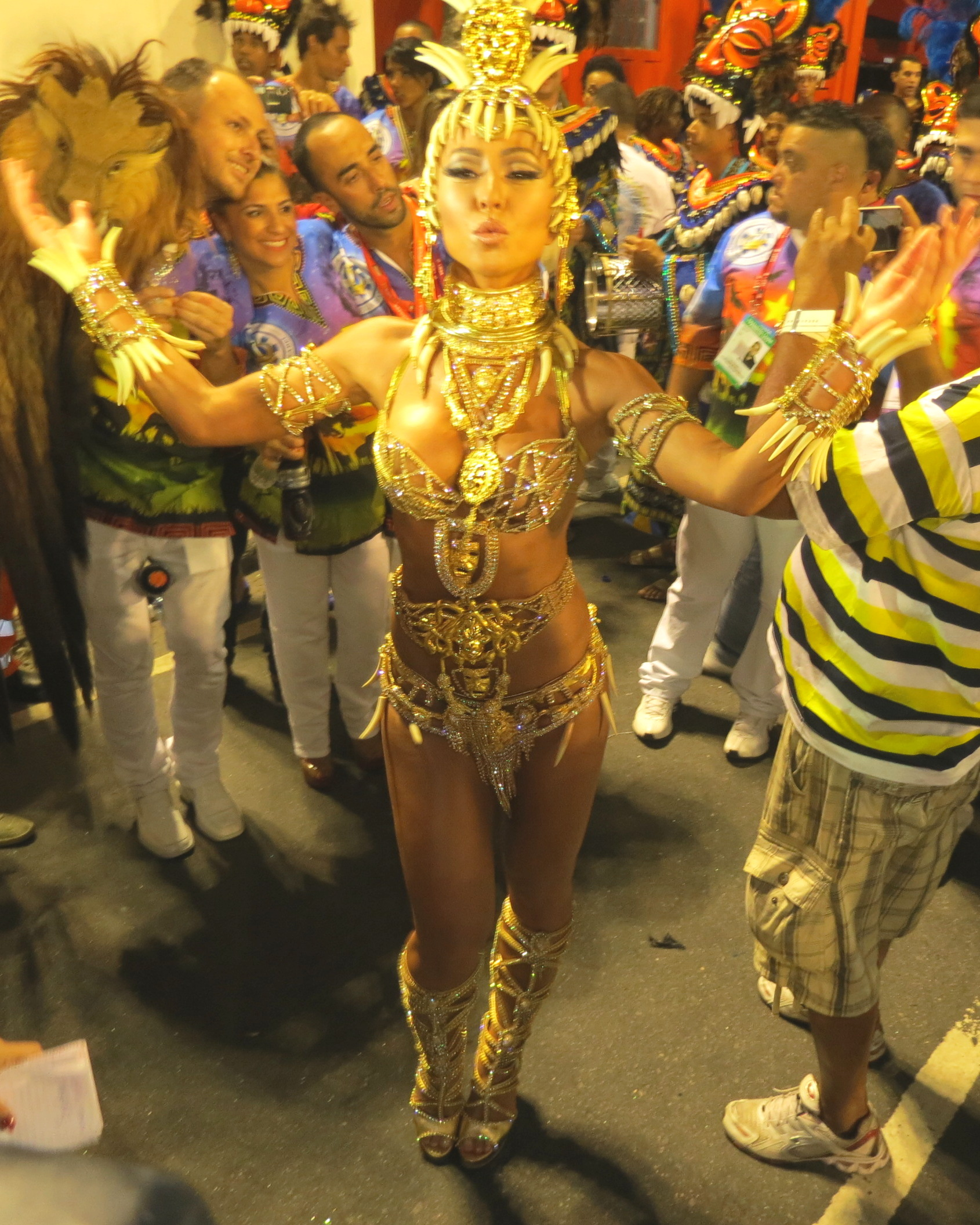 Unidos de Vila Isabel - Rio Carnaval 2012 04